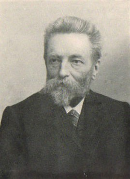 Bohumil Bauše (1845 - 1924), Český učitel, přírodovědec a spisovatel.